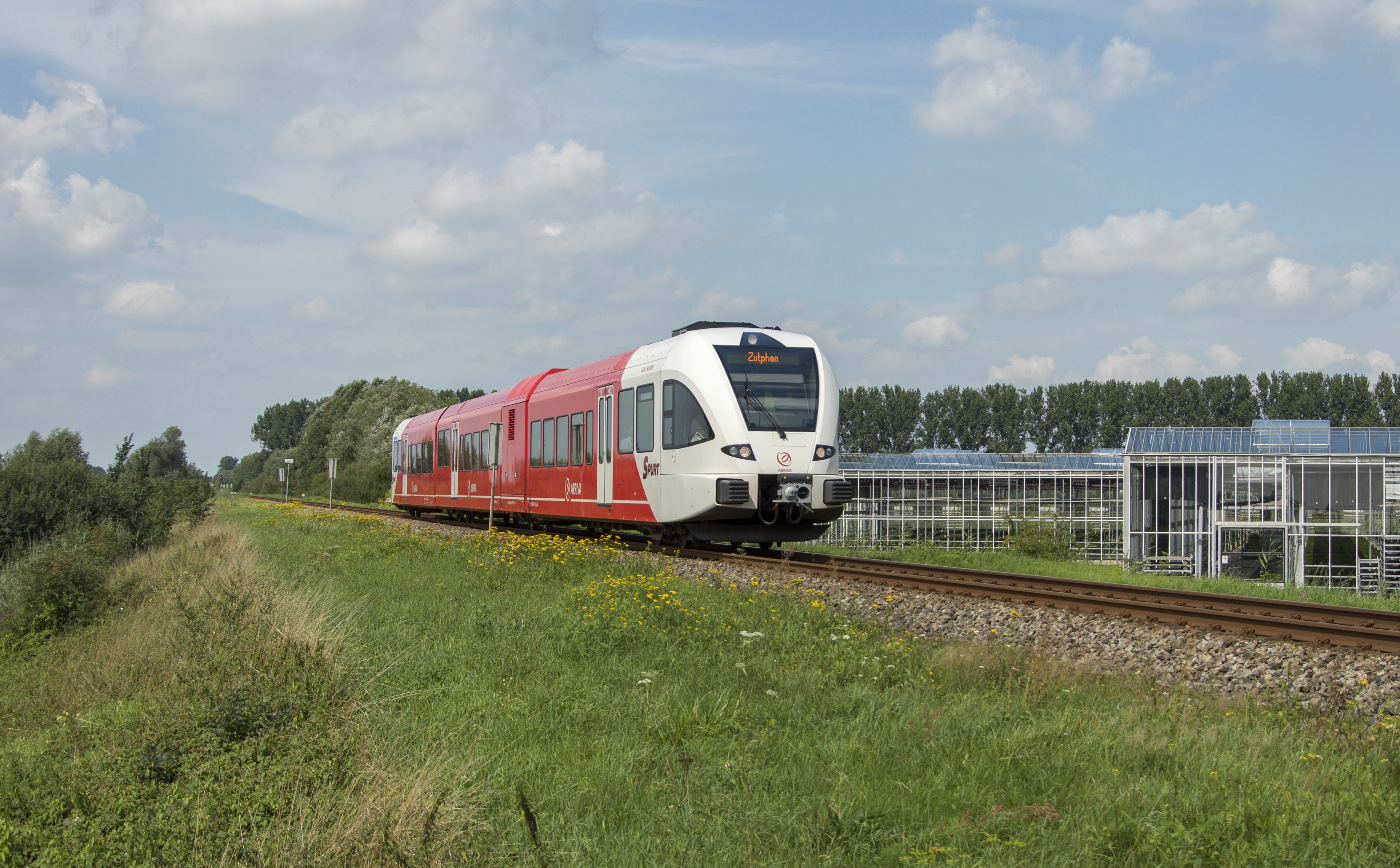 Vanaf de richting Voorst rijdt Arriva GTW 2-8 367 (Guus Hiddink) als trein 17837 Apeldoorn-Zutphen.